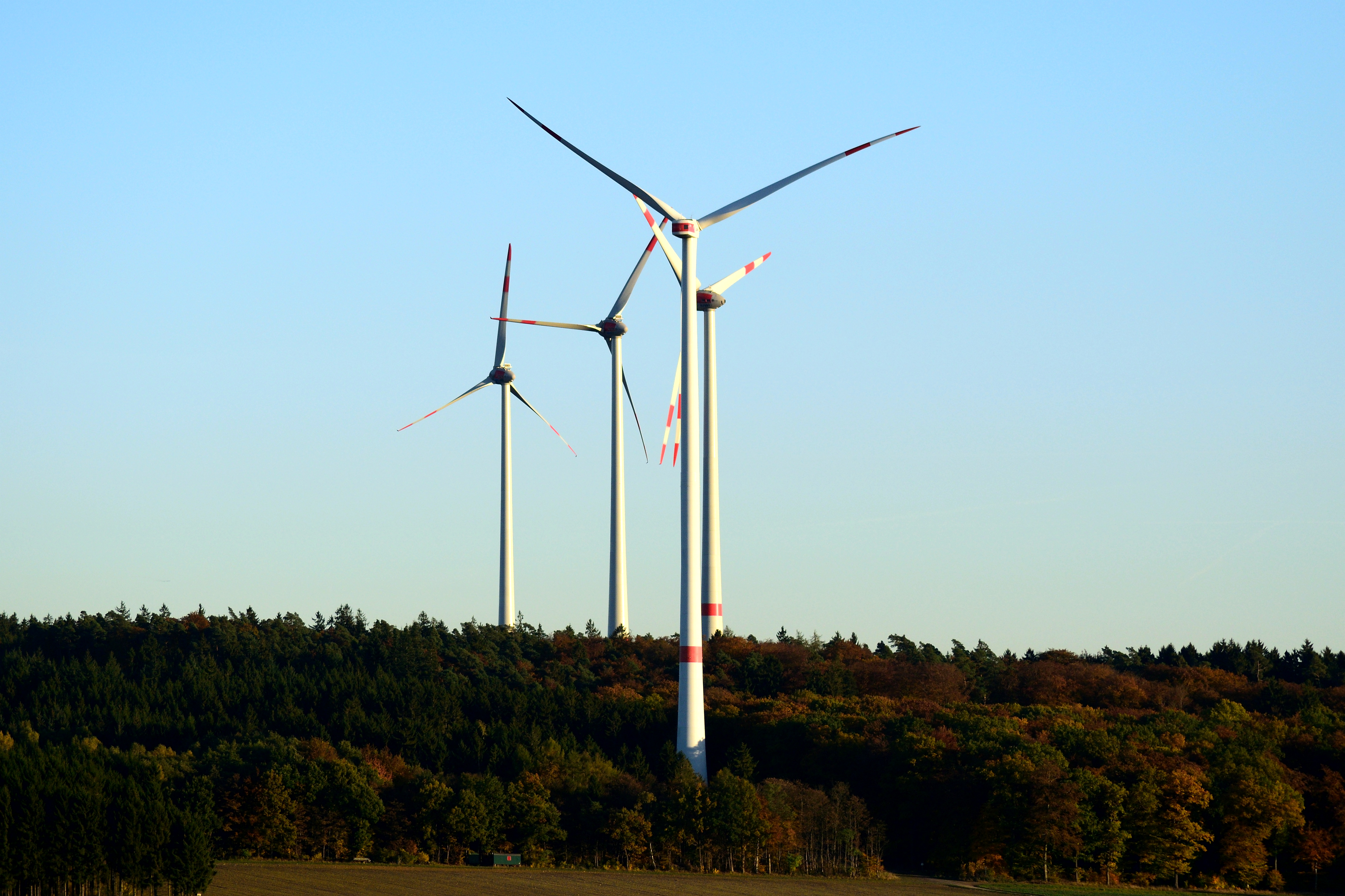 Windkraftanlagen im Hunsrück an der B 327, Windpark Beltheim